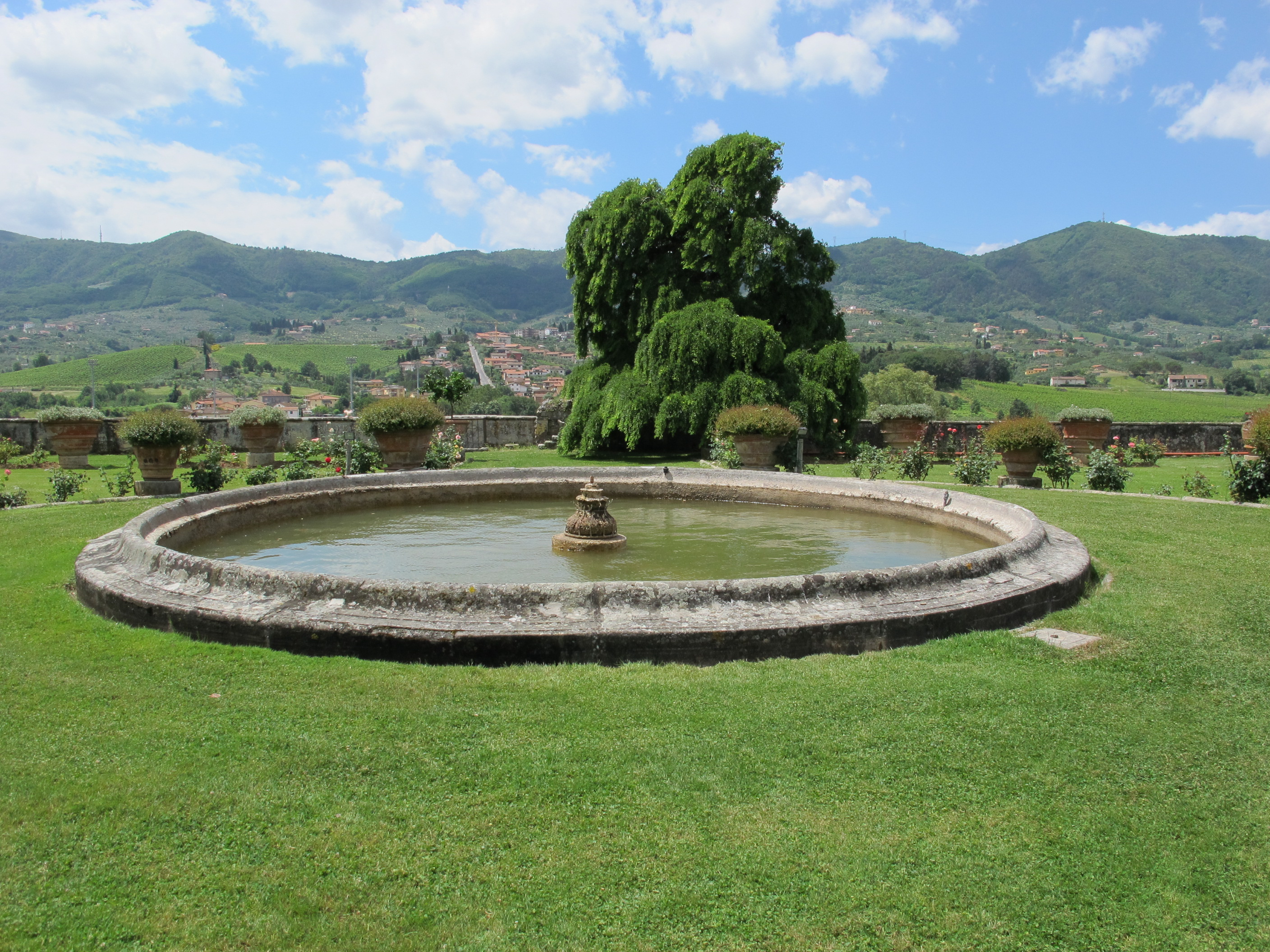 Villa la magia, giardino 05 fontana